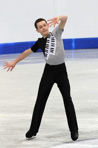 Петр Цоуфал (Чехия) на чемпионате мира по фигурному катанию среди юниоров 2012